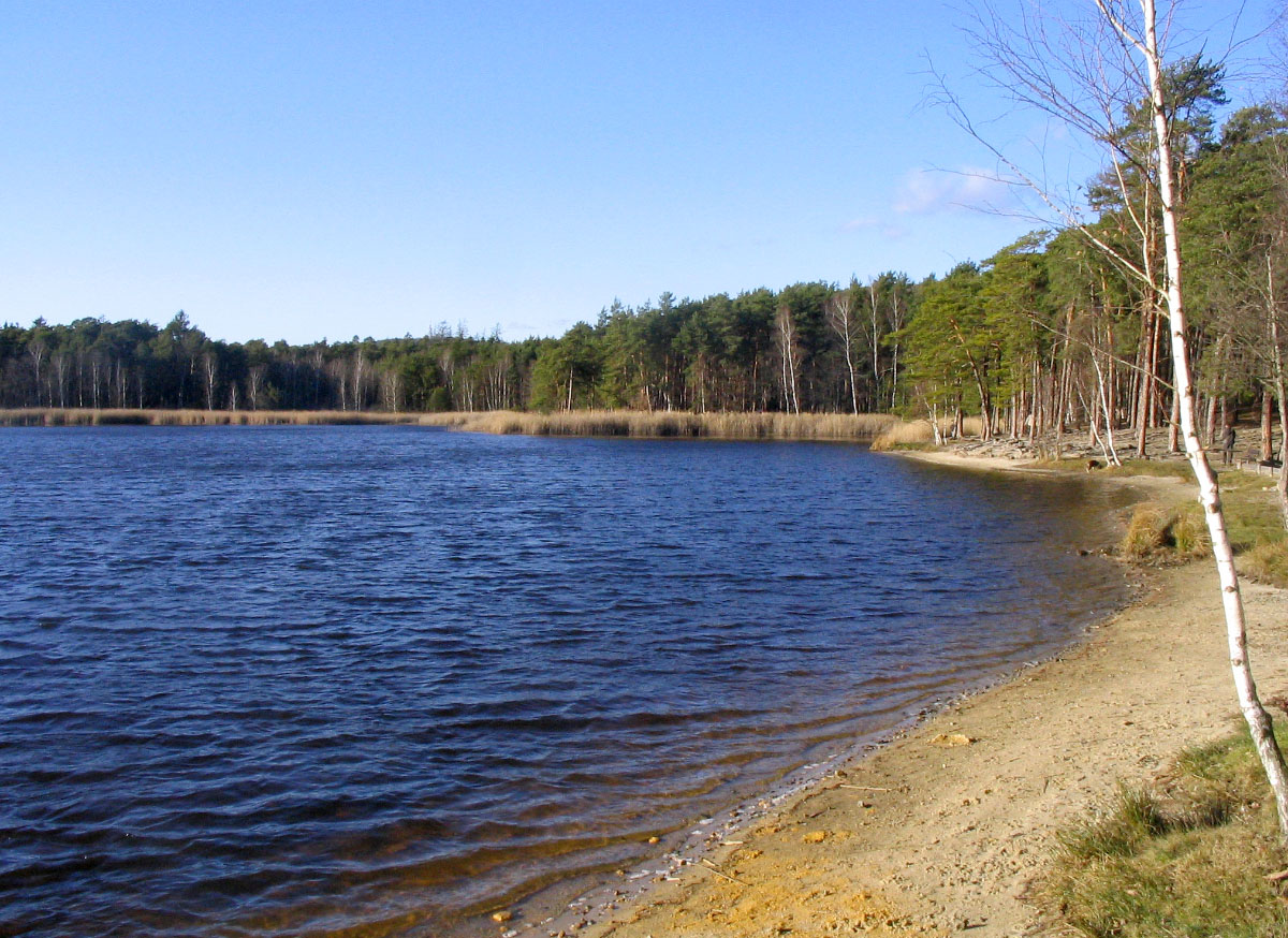 Písečná pláže na severovýchodním břehu Kamenného rybníka na severním okraji Plzně.